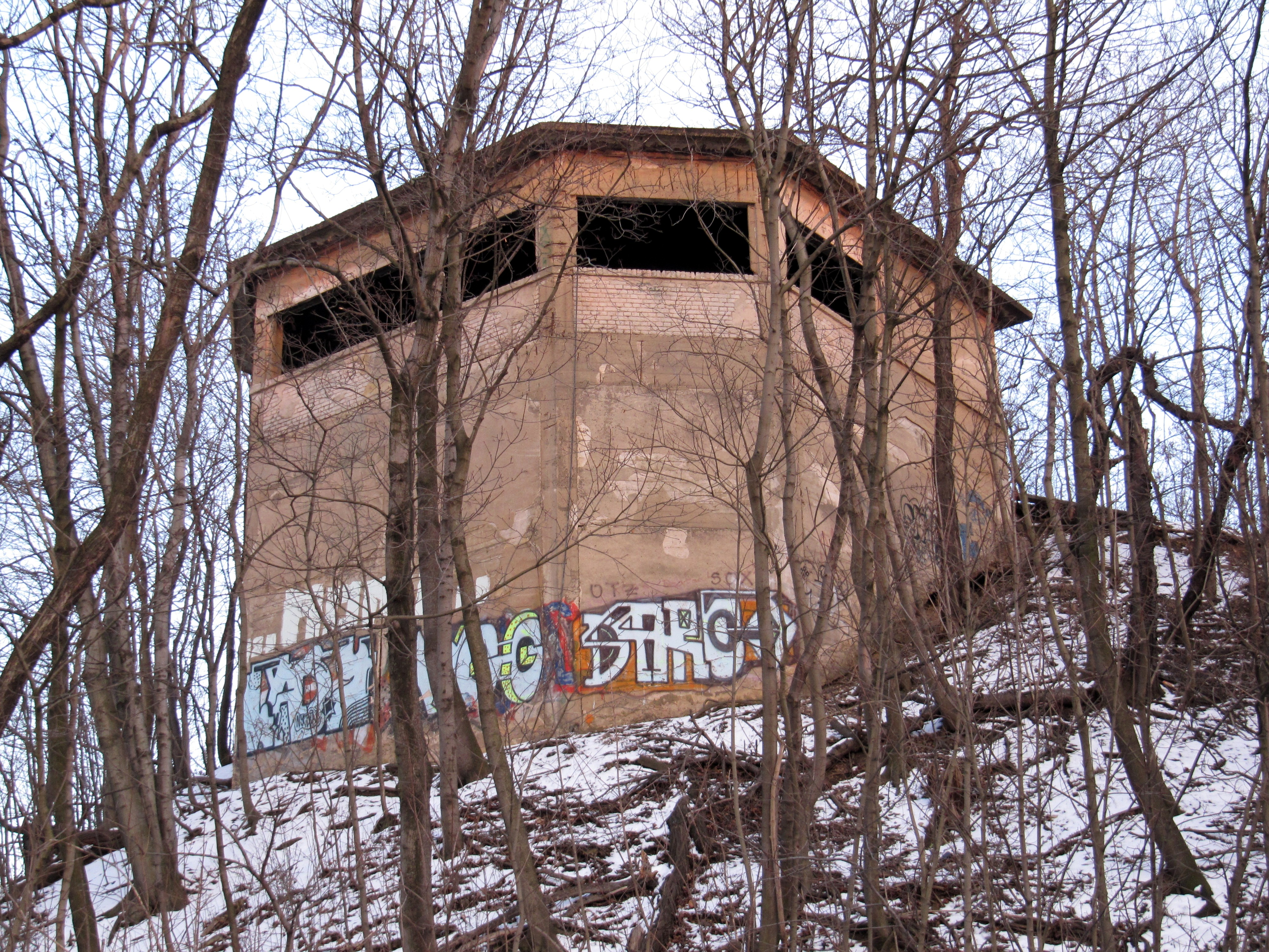 Ehemaliger Maschinenraum der Seilablaufanlage des Bahnhofs Dresden-Friedrichstadt